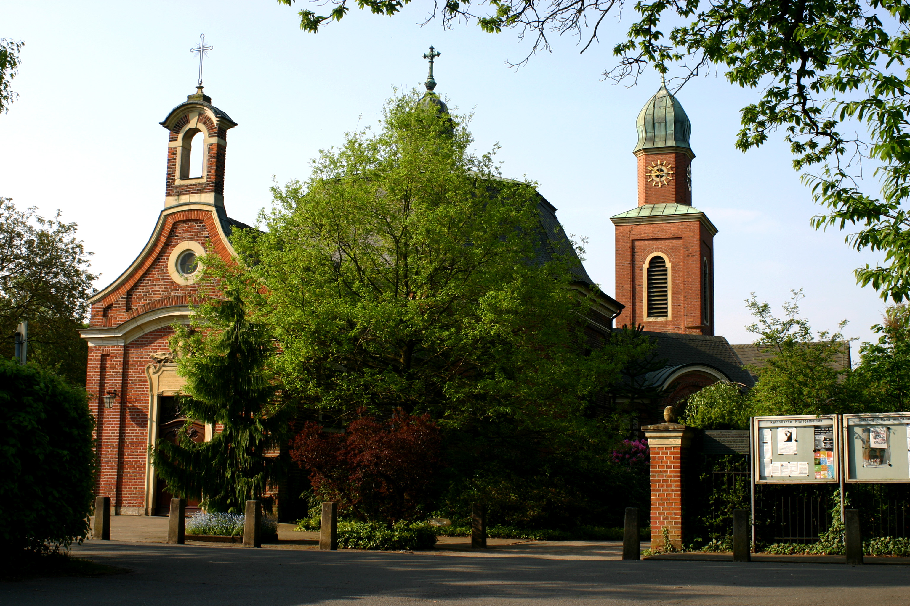 Pfarrkirche der Gemeinde St. Mariä Himmelfahrt, Münster (Dykburg)